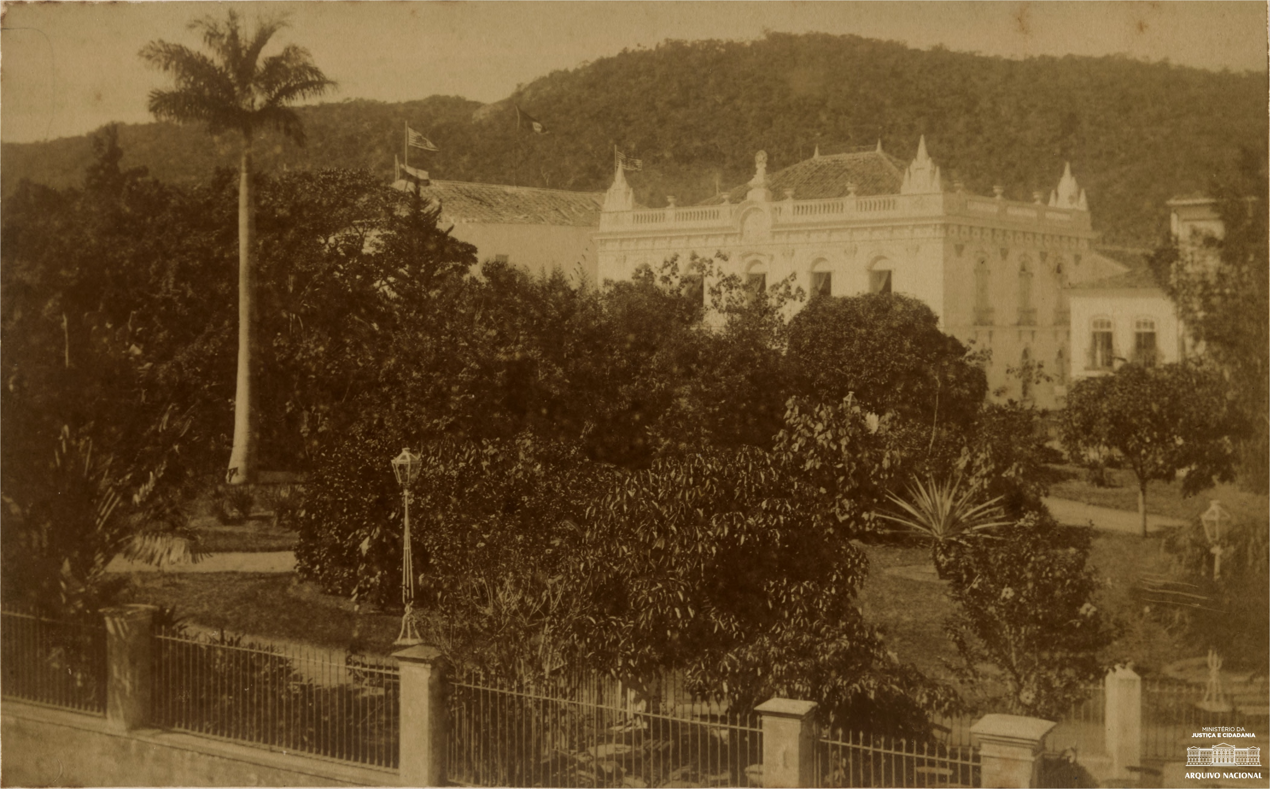 Jardim Almirante Gonçalves (atual Jardim Oliveira Bello), na Praça XV de Novembro, centro de Florianópolis, primeiras décadas do século XX. Arquivo Nacional.